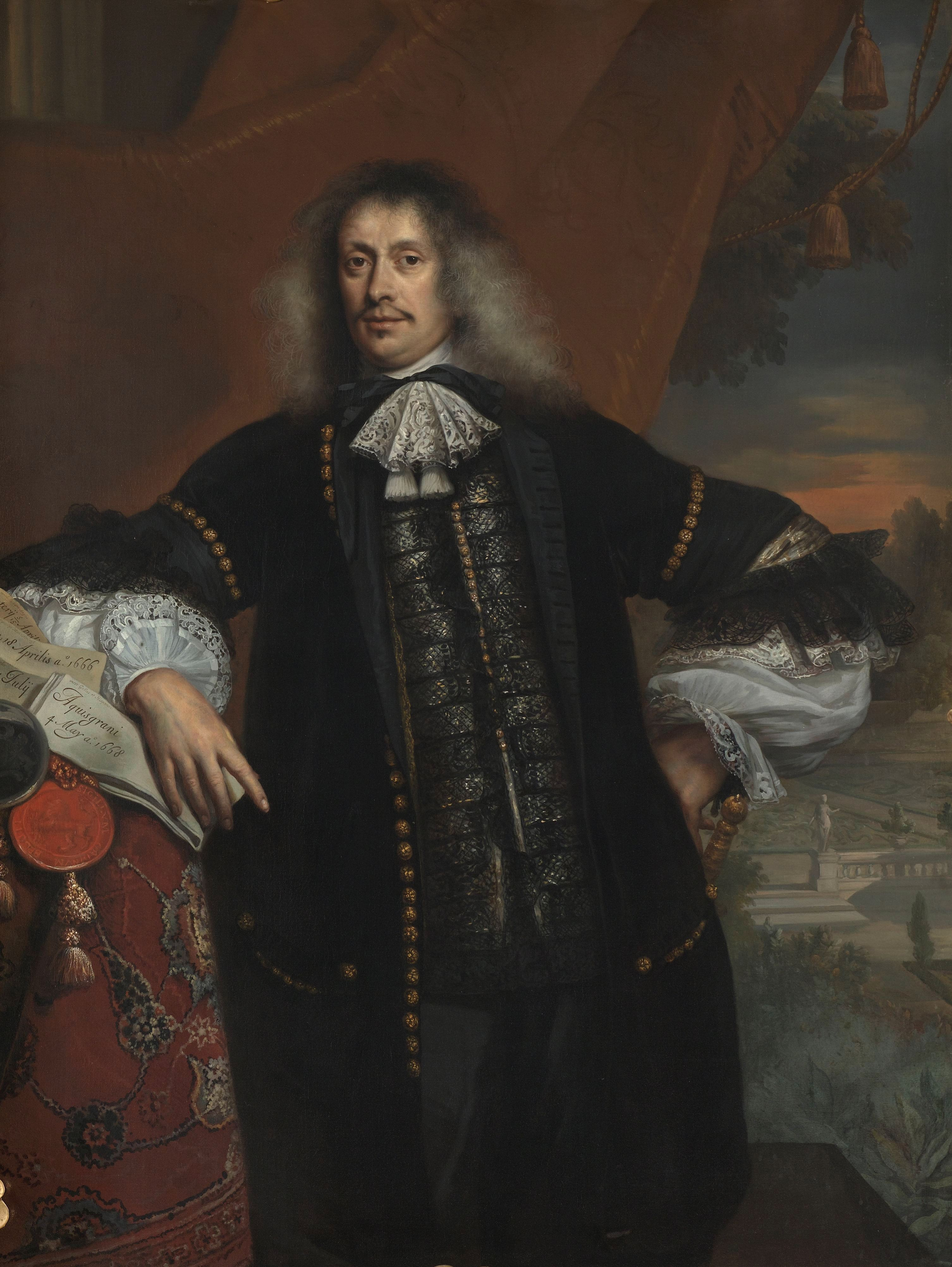 Portret van Hieronymus van Beverningk, Heer van Teylingen, thesauriergeneraal. Kniestuk, bij een tafel waarop documenten met zegels liggen. Rechts een doorkijk naar een tuin.